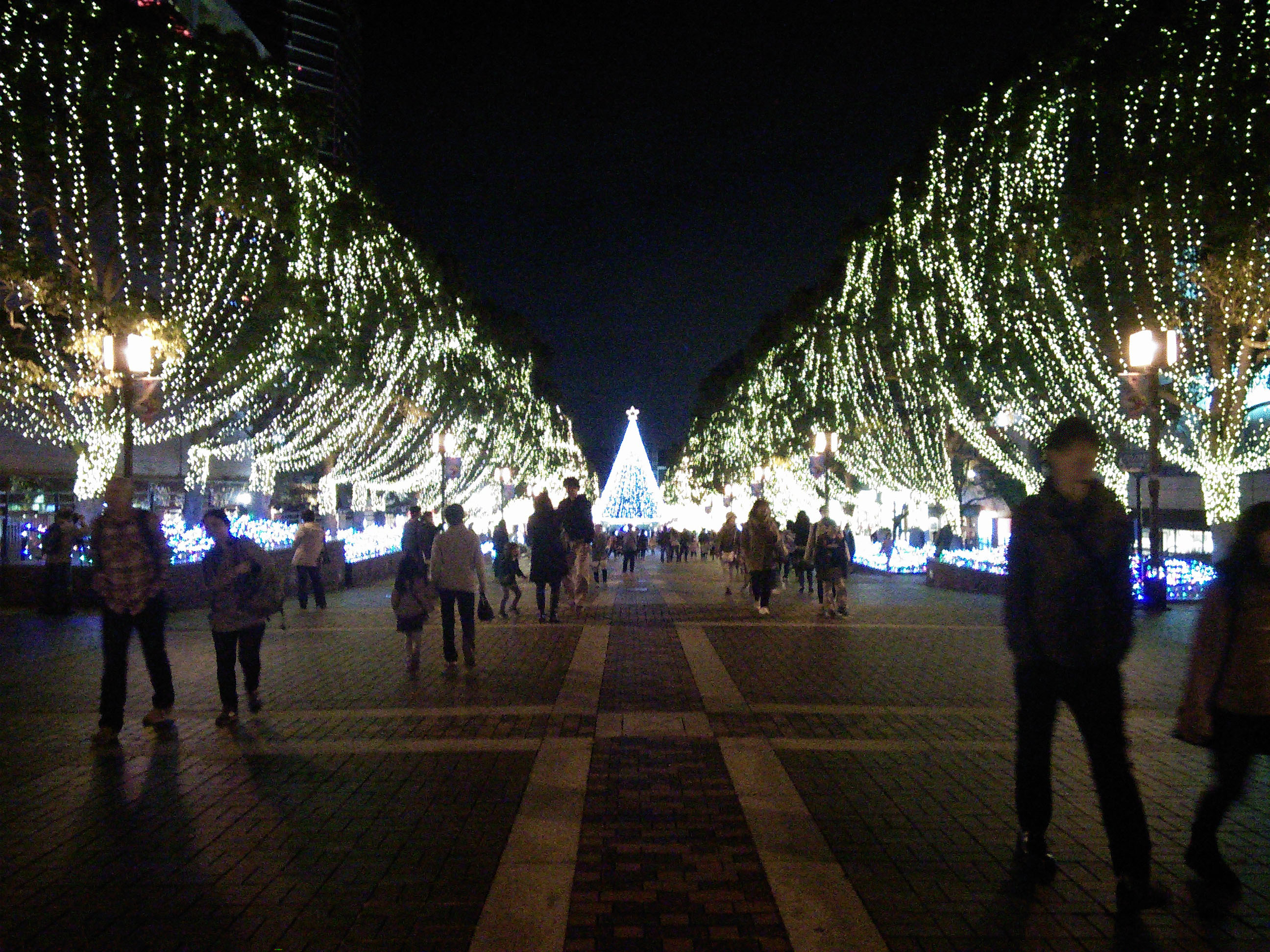 多摩センターのクリスマスイルミネーション（2014/11/23撮影）